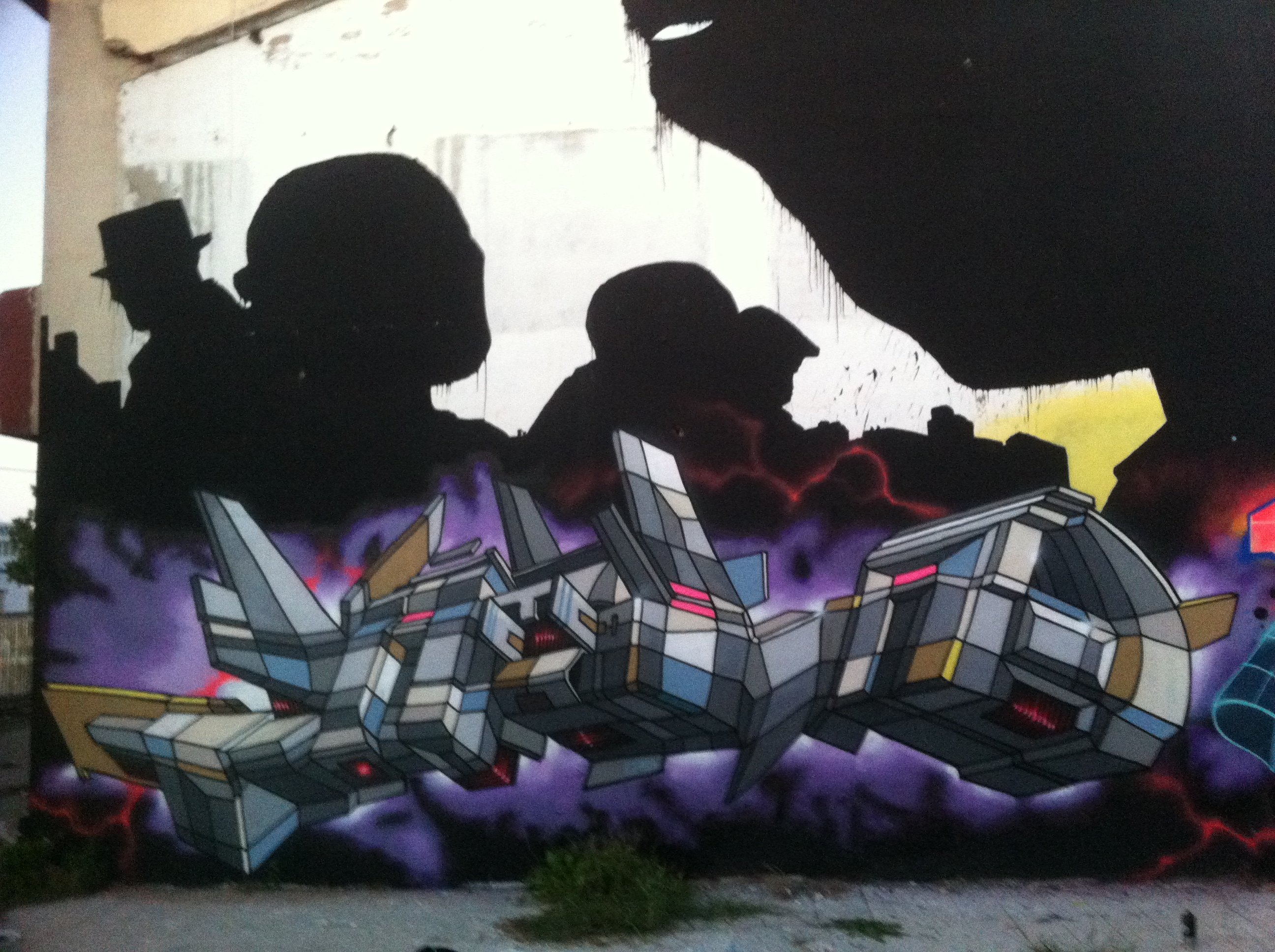 Graffiti Matola Spain 2014